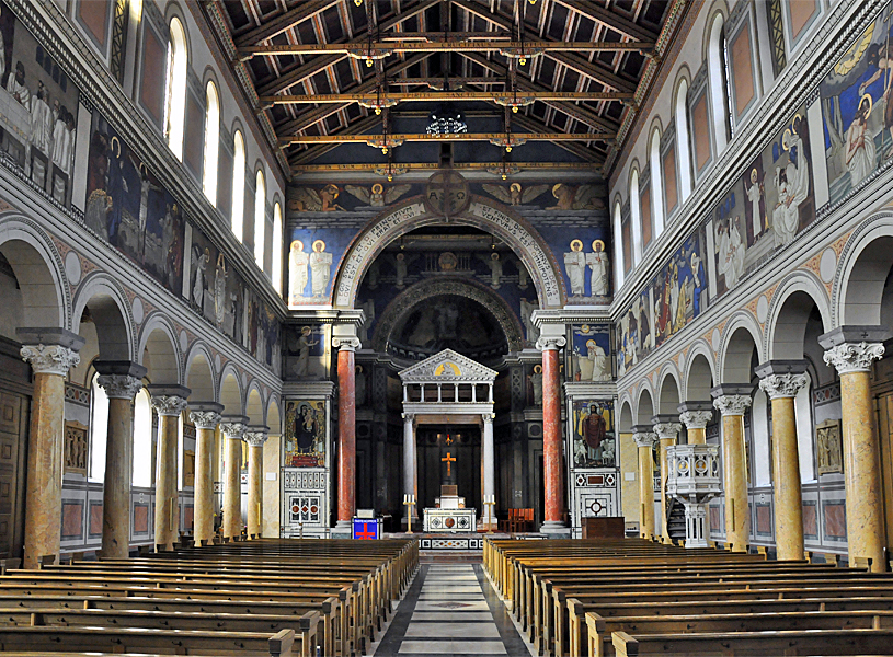 Liebfrauenkirche, Zürich. Inennansicht.